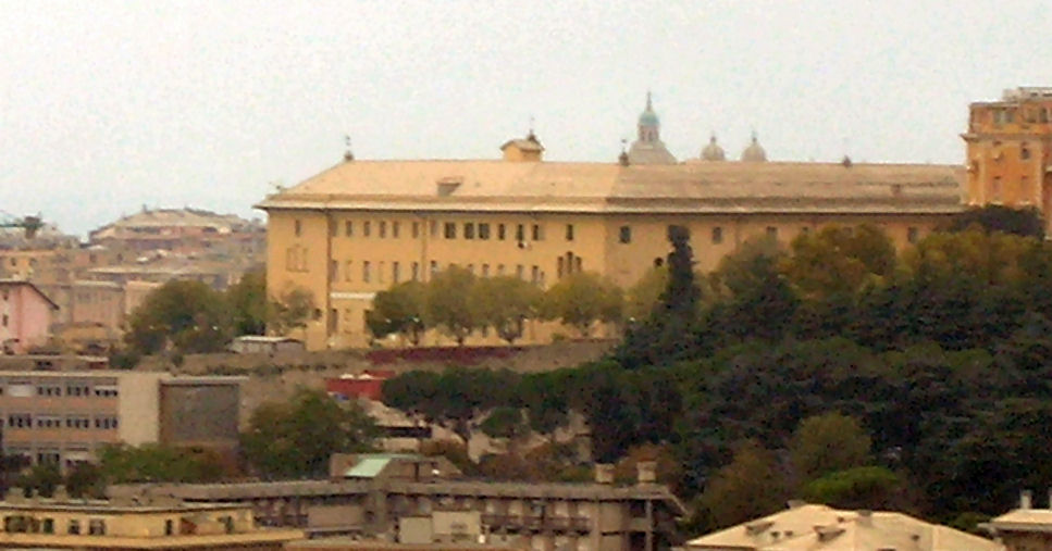 autore f.noceti